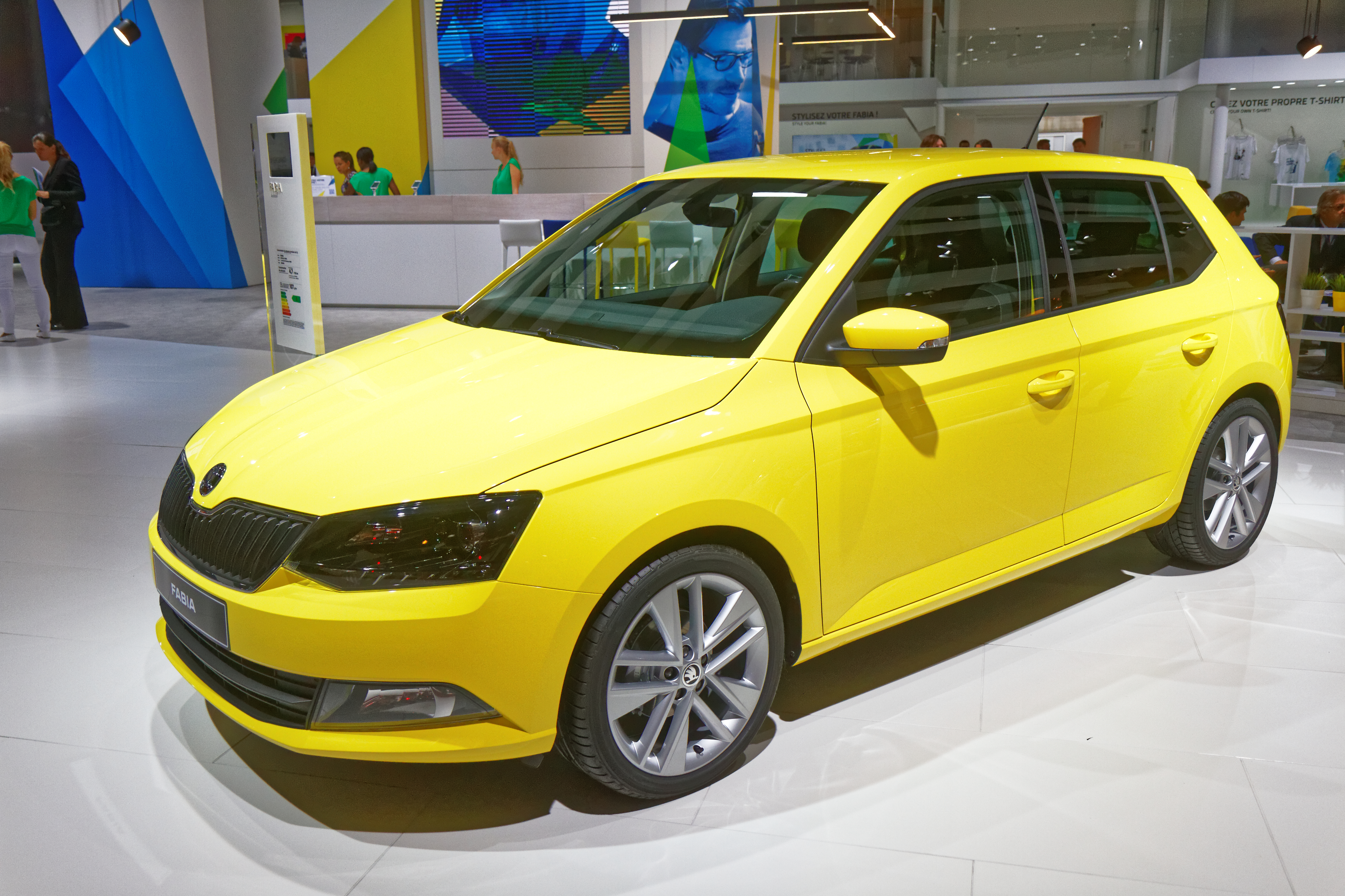 Une Škoda Fabia présentée lors du mondial de l'automobile de Paris 2014.